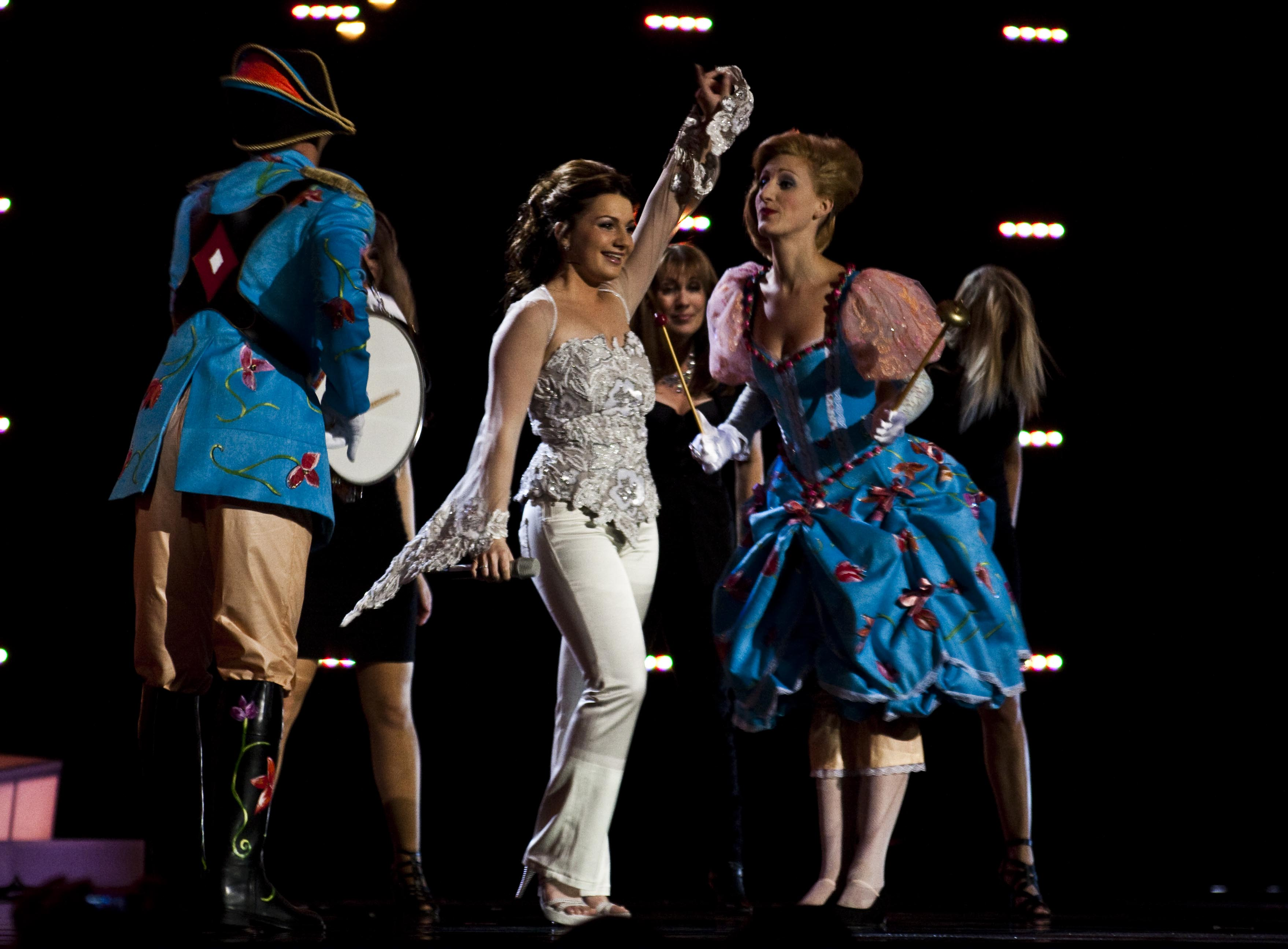 Foto: Ane Charlotte Spilde, Aktiv I Oslo.no